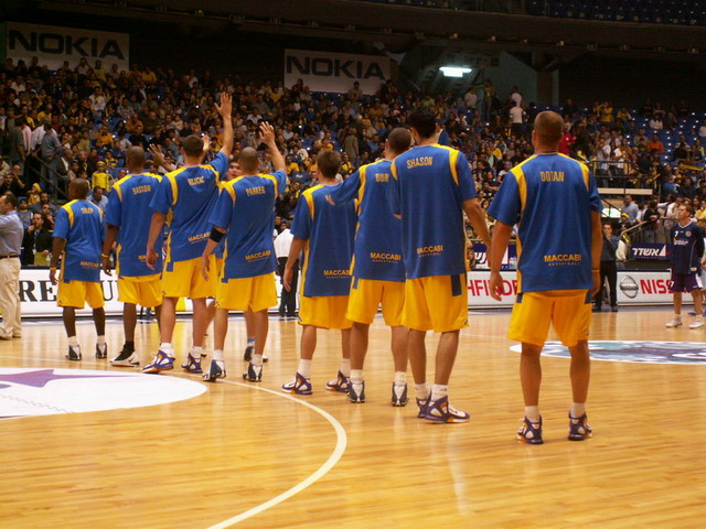 מכבי תל-אביב, כולם למען אחד ואחד למען כולם. צולם על-ידי אבי קדמי ב - 2005 - 2006.